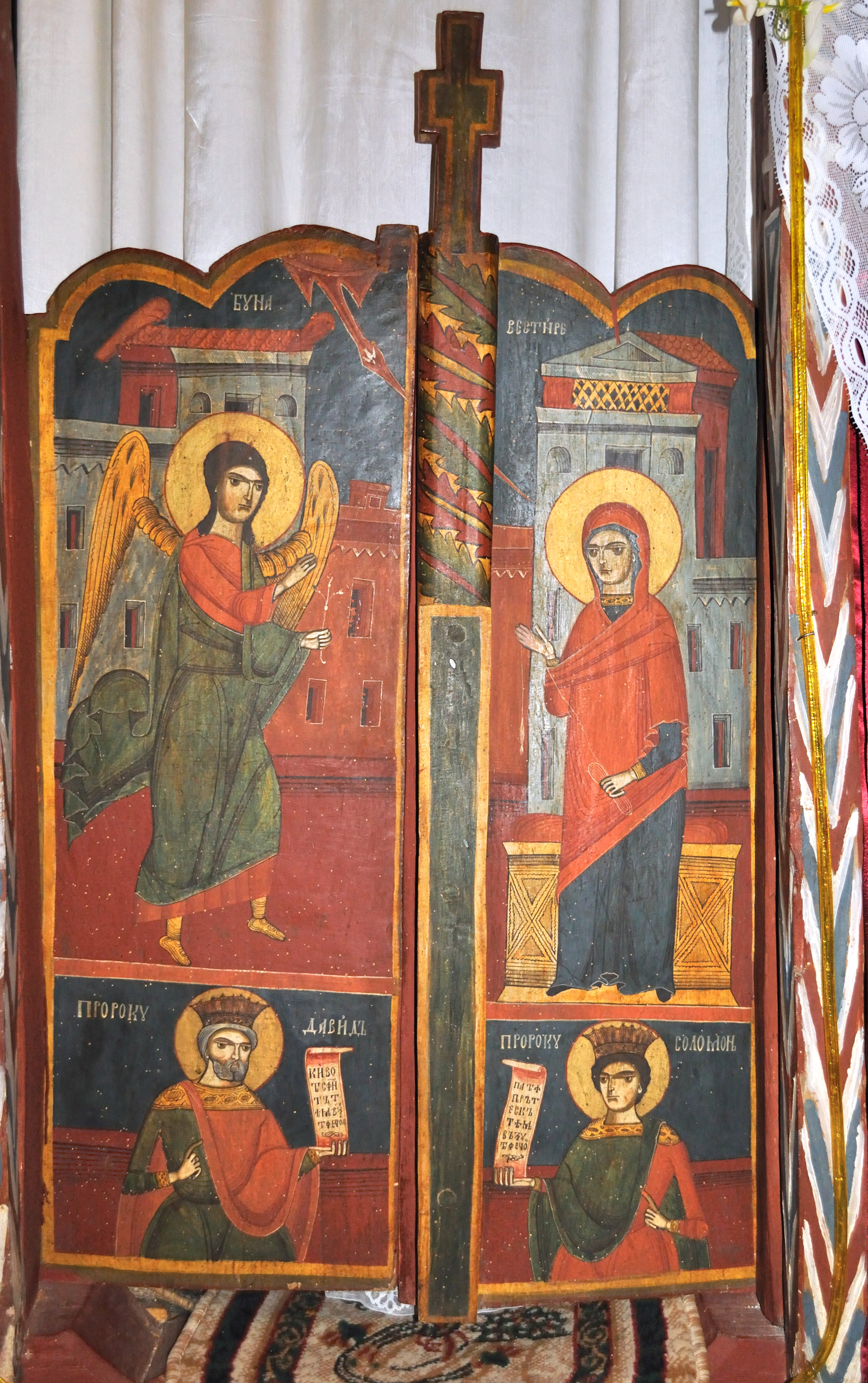 Biserica de lemn „Cuvioasa Paraschiva” din Dumbrăveşti, Vâlcea